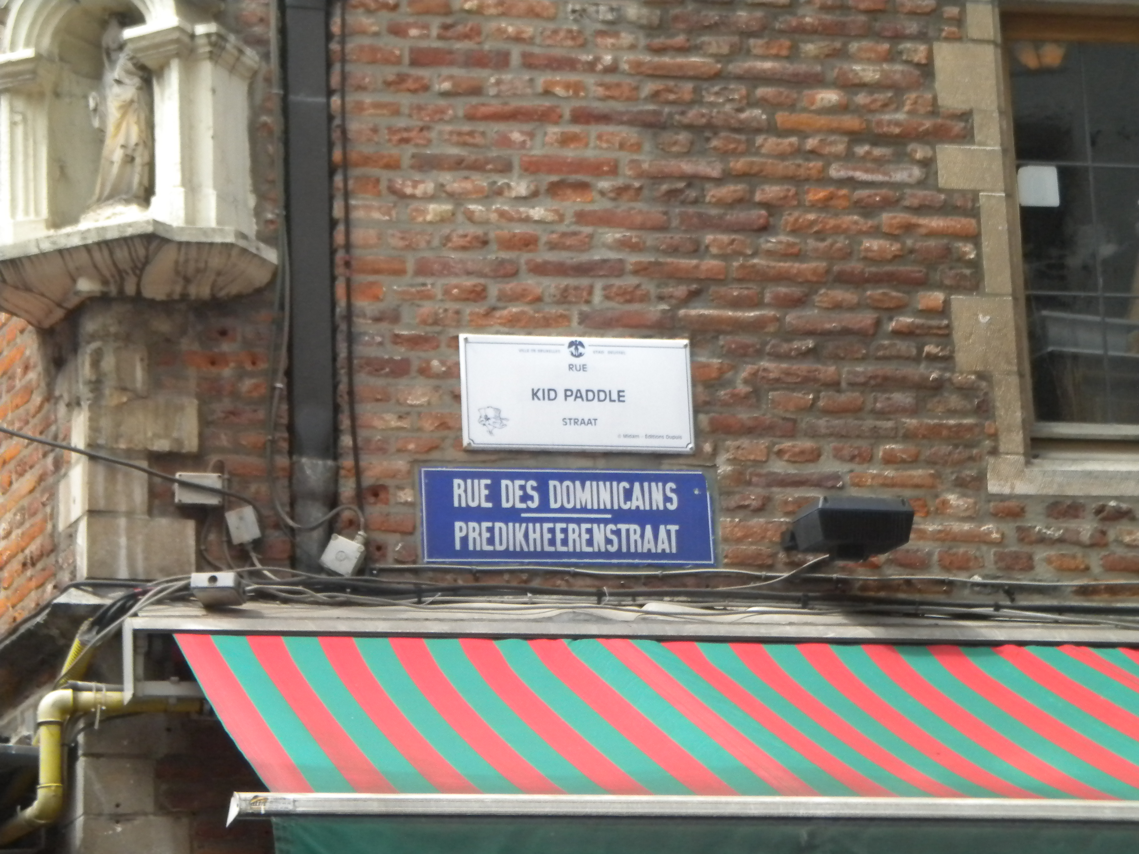 Plaque de la rue Kid Paddle à Bruxelles.